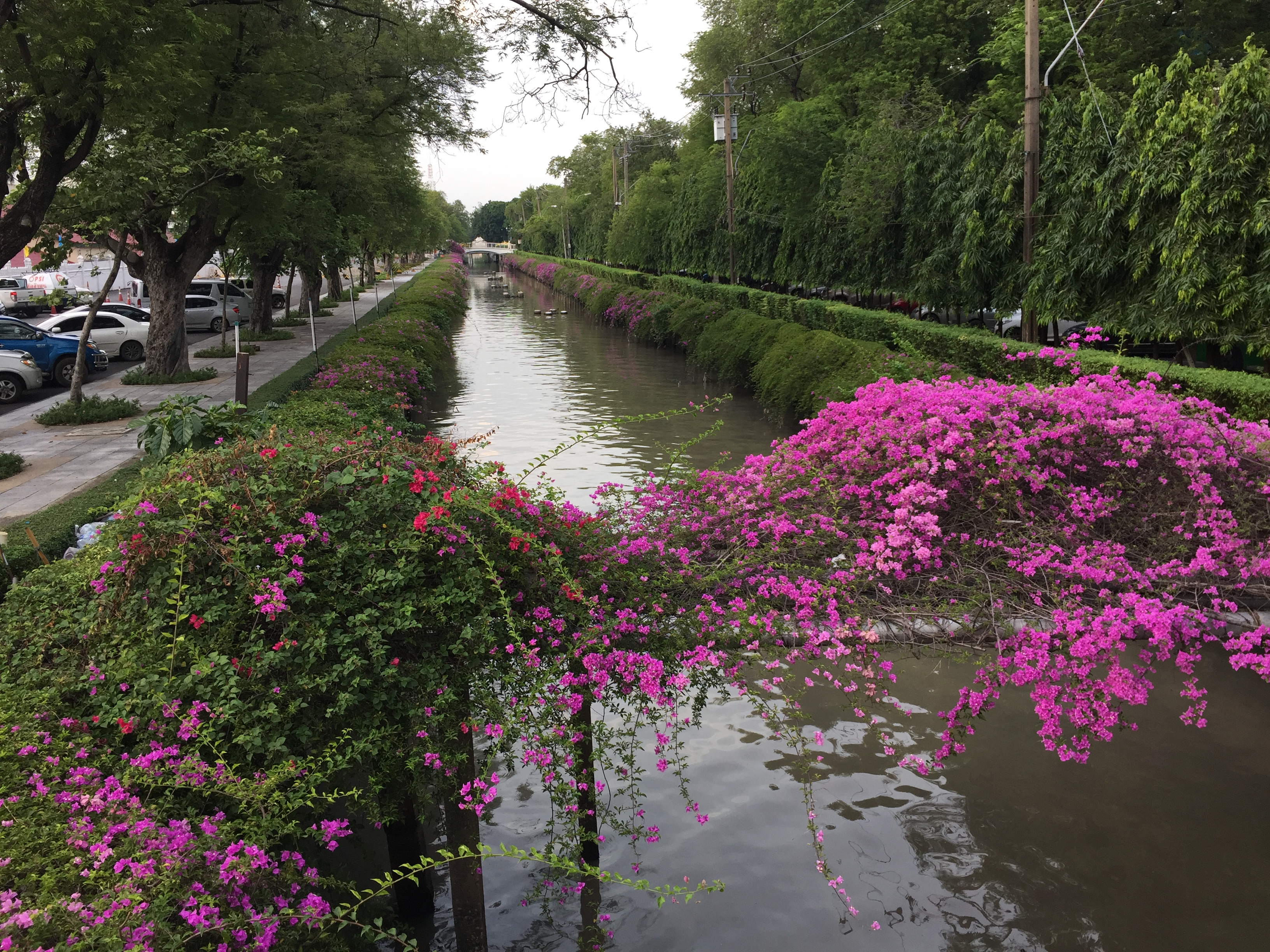 คลองเปรมประชากรข้างทำเนียบรัฐบาล